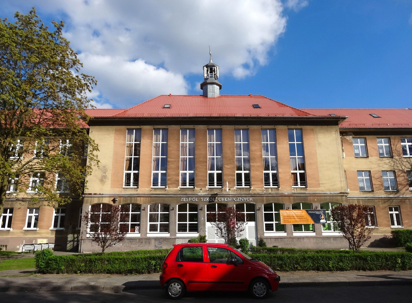 Budynek Zespołu Szkół Chemicznych przy ul. Łukasiewicza w Bydgoszczy